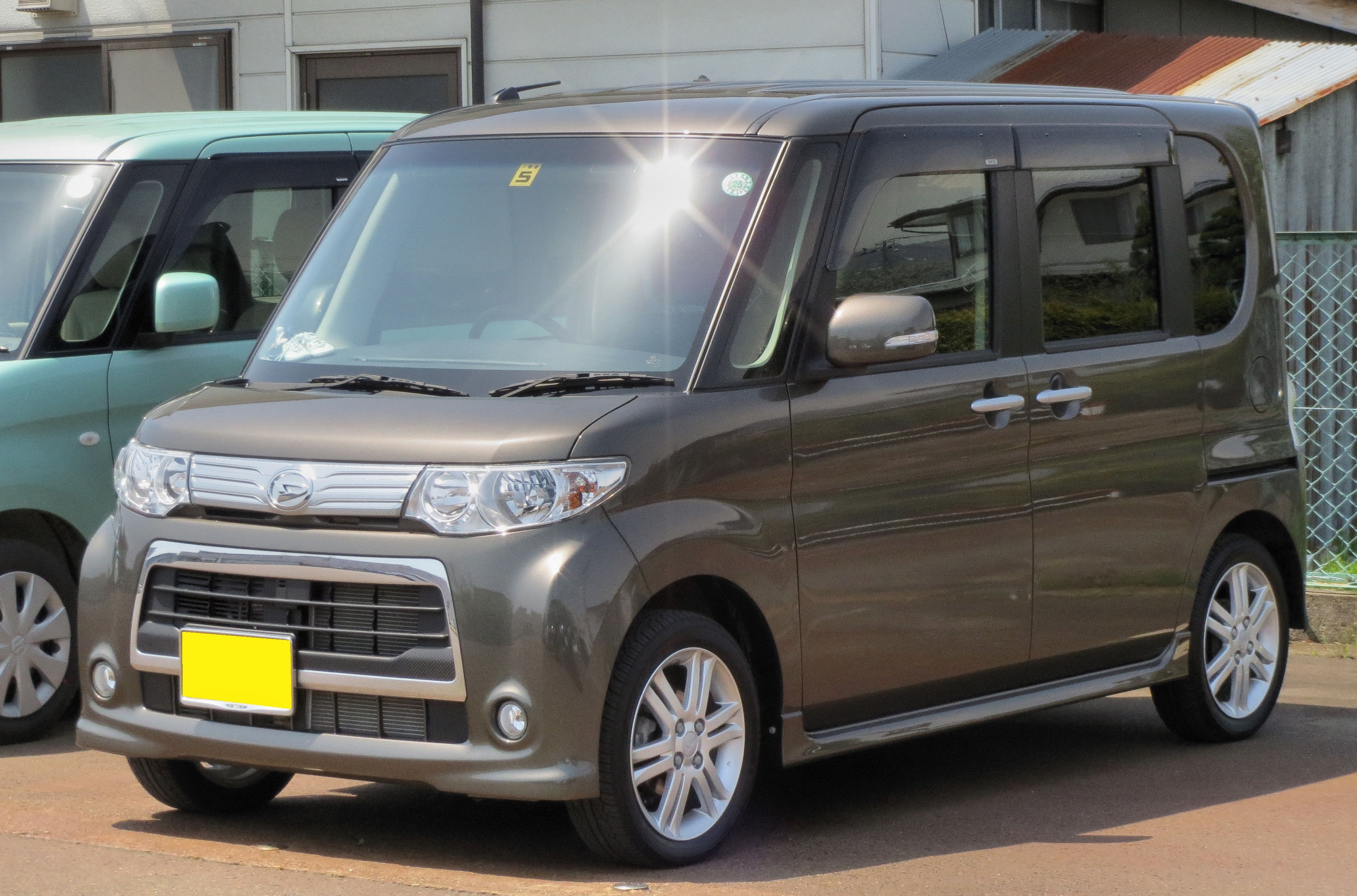 ダイハツタントカスタムRS